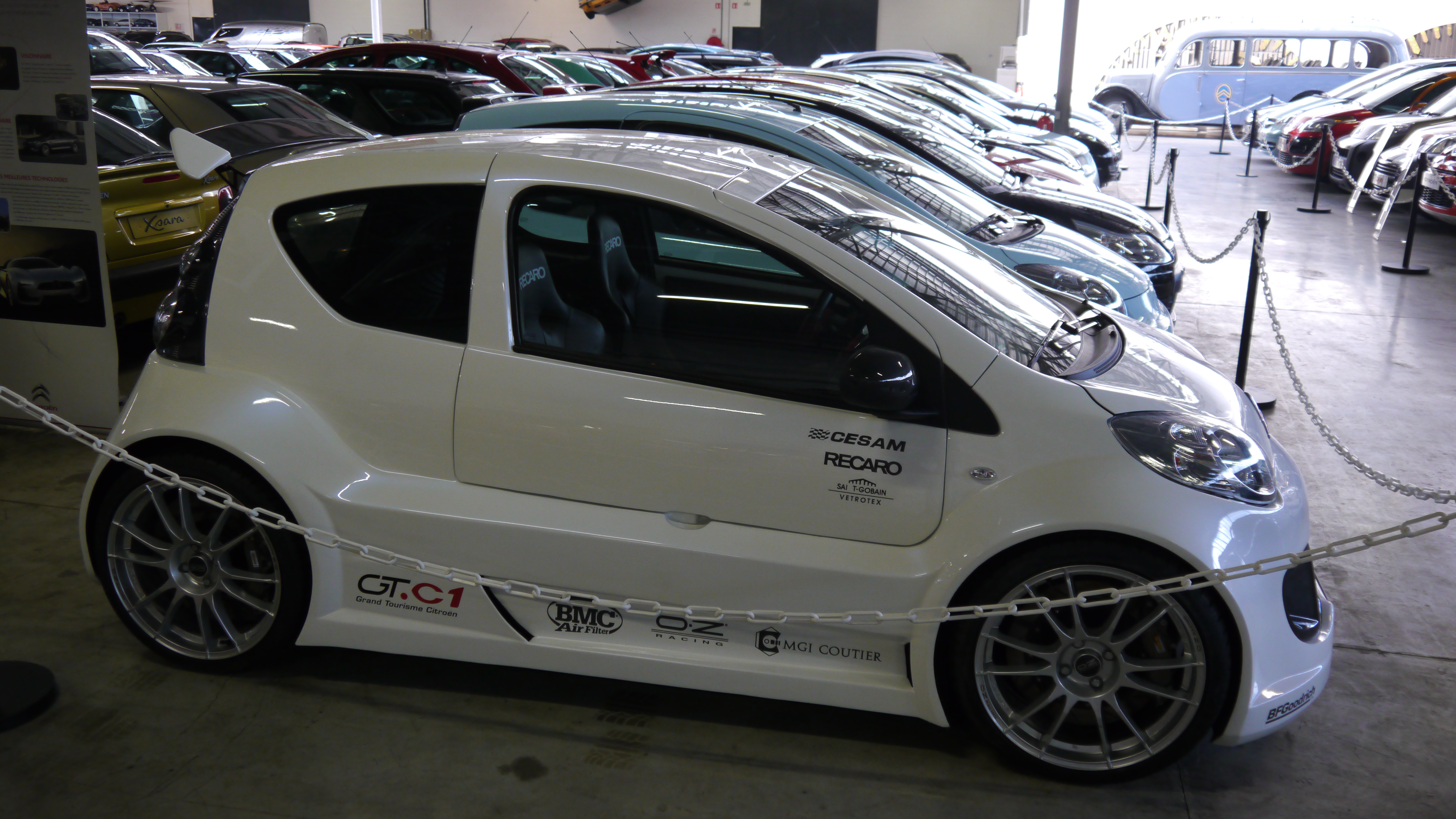 Conservatoire Citroen 211 Citroen GT C1